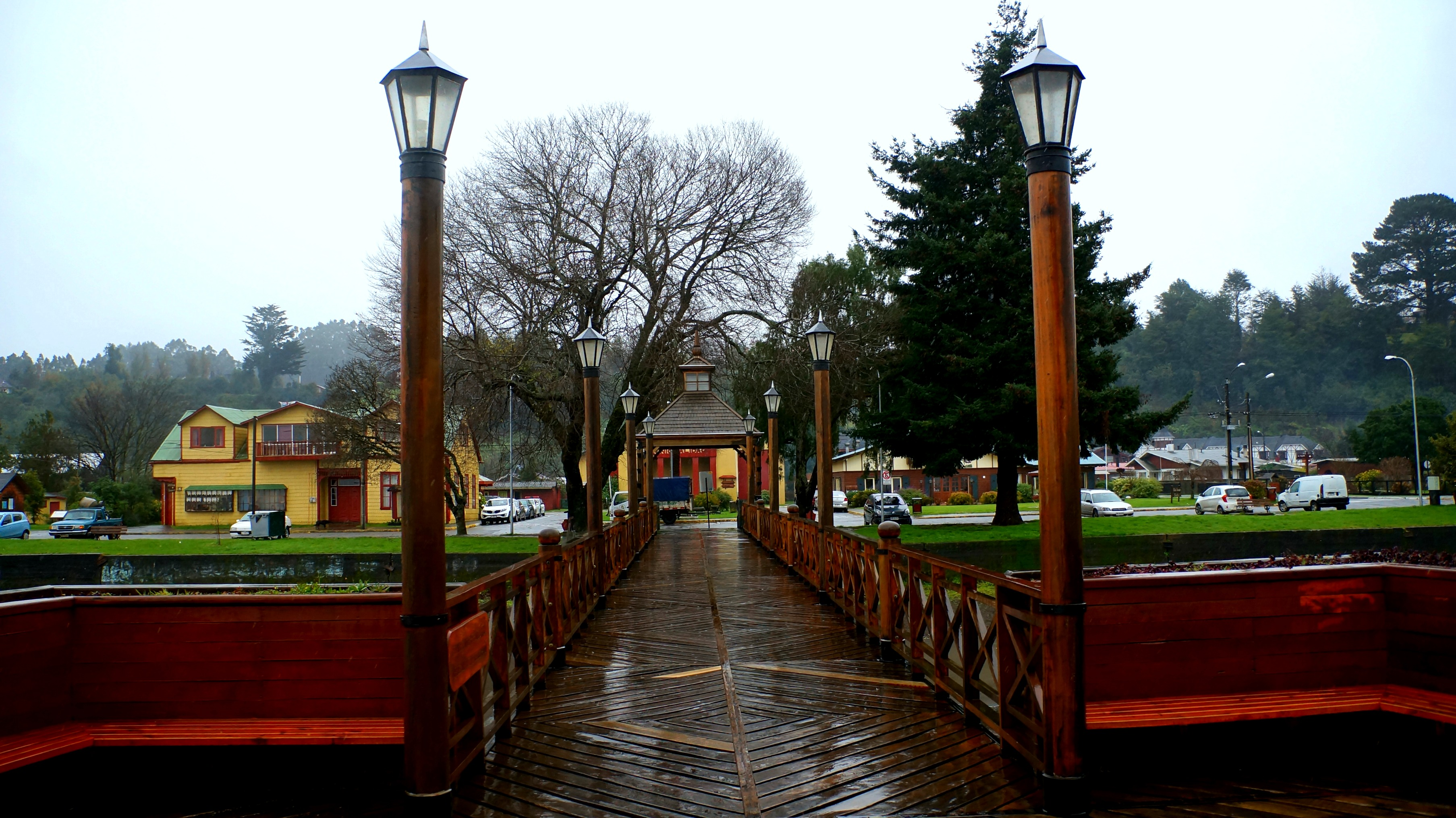 Frutillar Bajo This is a photo of a national monument in Chile: 2242